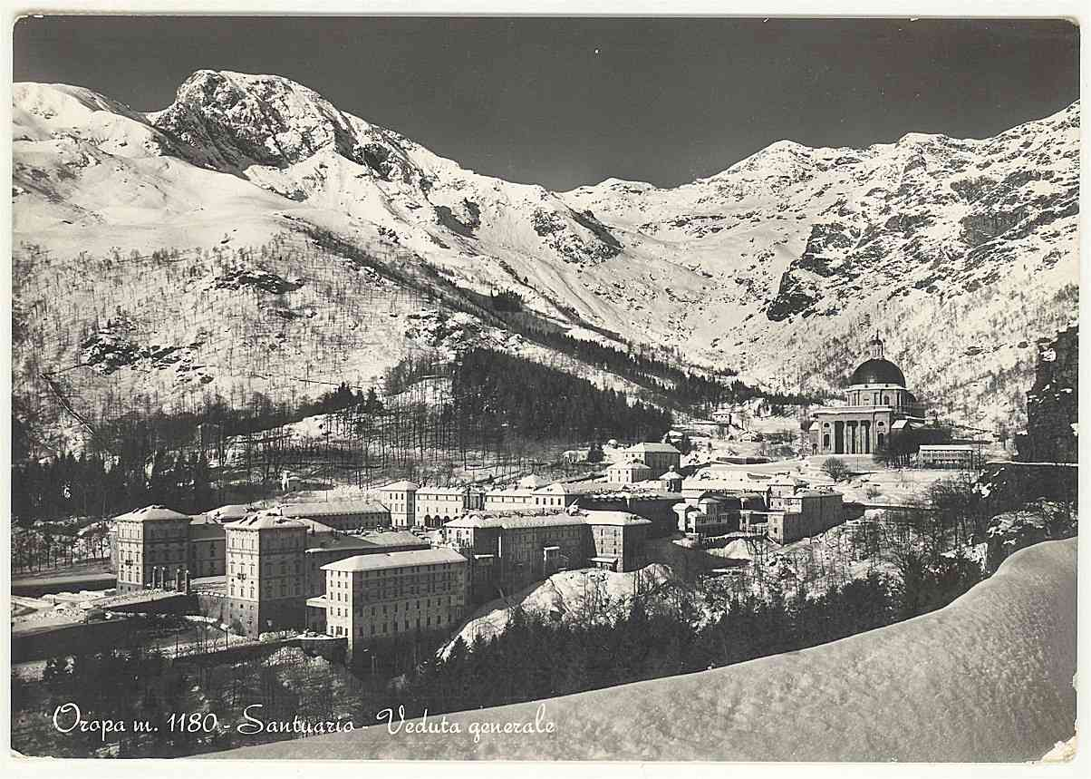 BI Oropa m.1180 Santuario - veduta generale